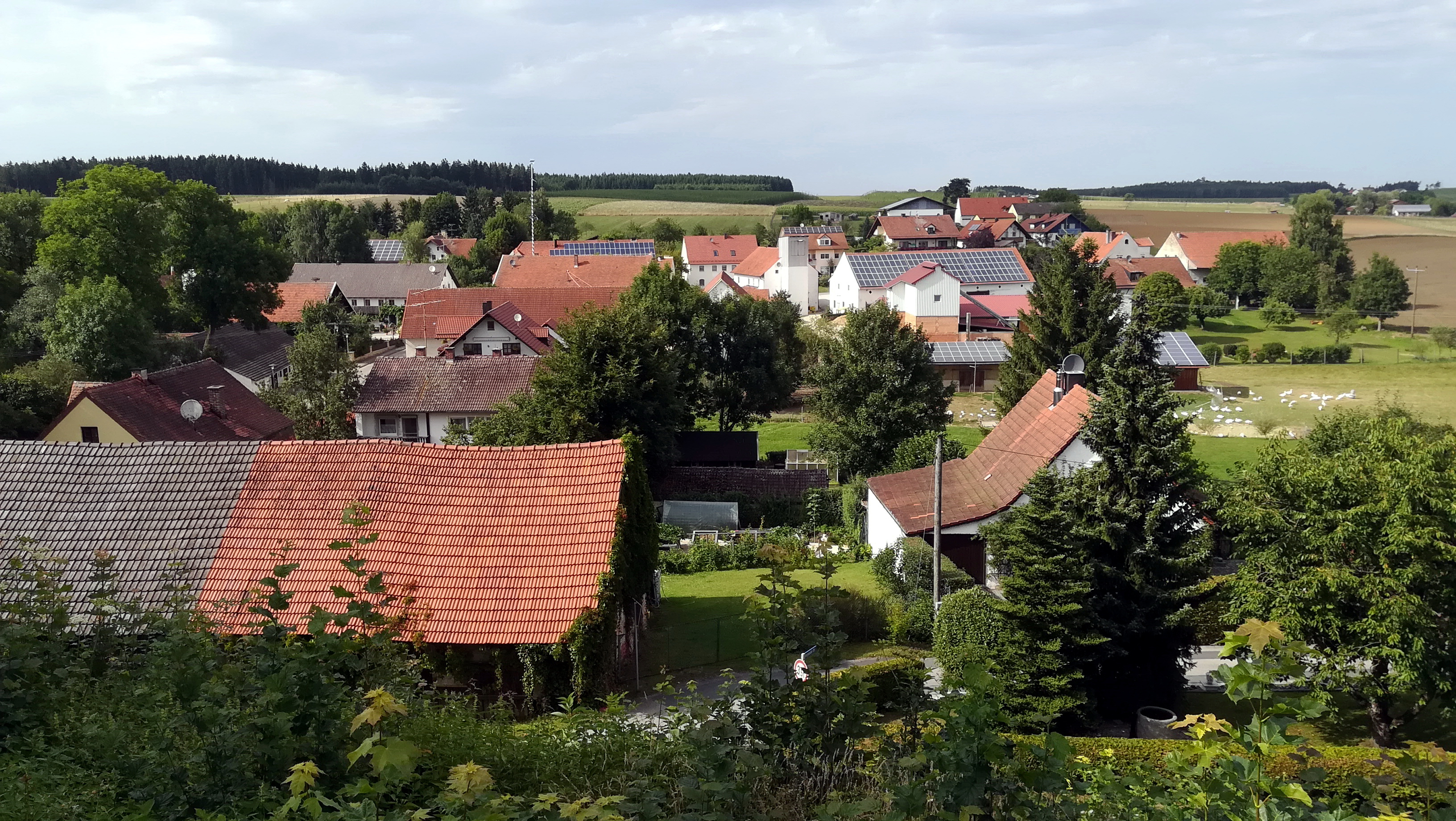 Hebrontshausen ist ein Ortsteil der Gemeinde Rudelzhausen.